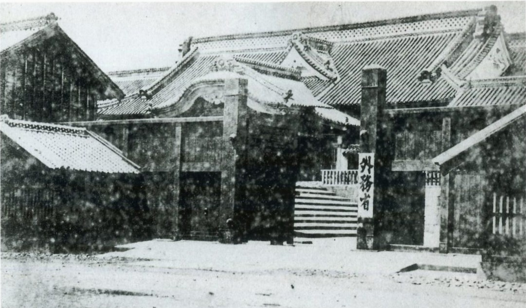 1871年(明治3年)から1877年(明治9年)までの外務省。1877年2月1日焼失。